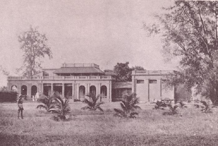 Hauptgebäude der Theosophischen Gesellschaft in Adyar (Chennai) im Jahr 1890